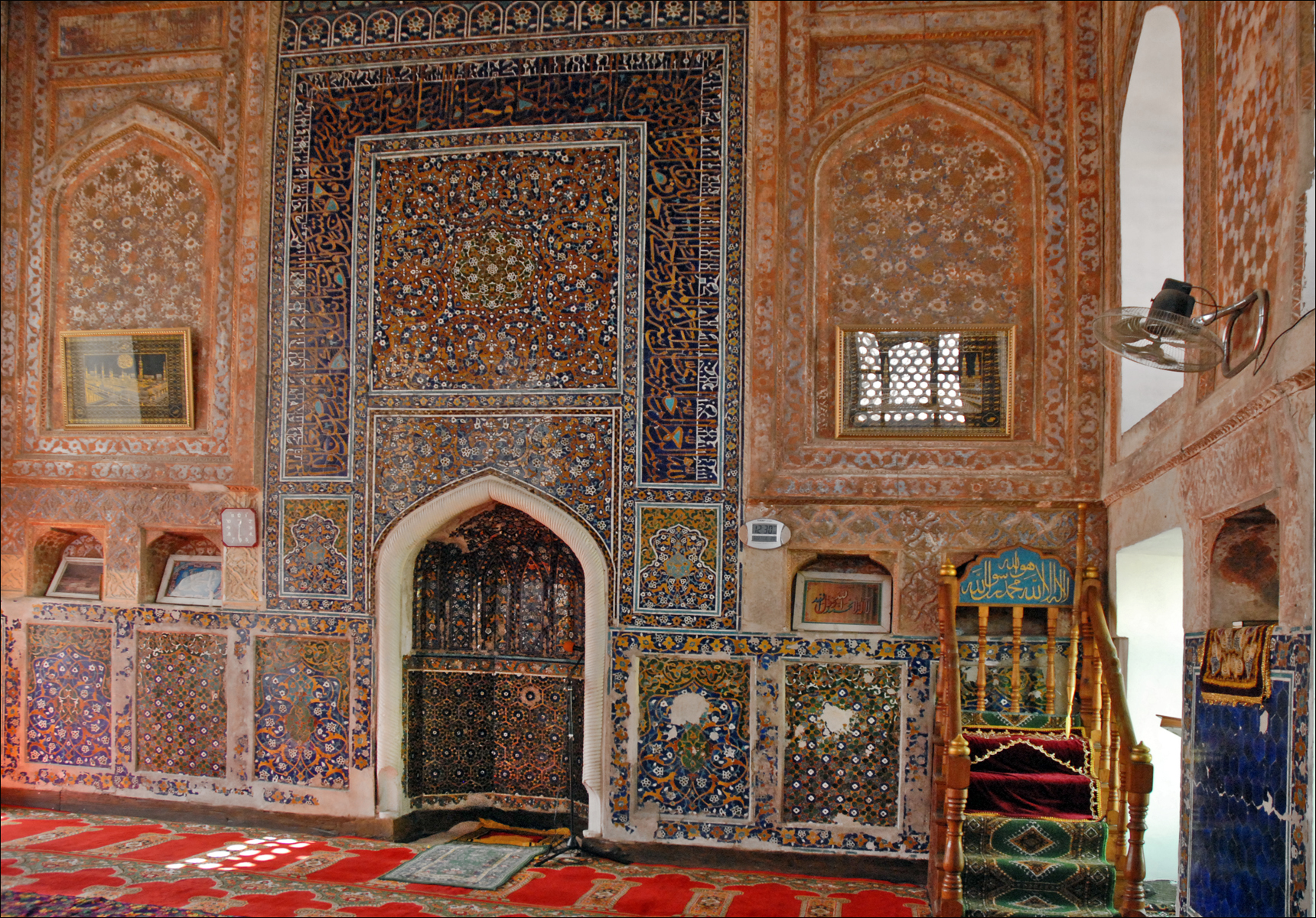 L'intérieur de la mosquée Baland (Balyand), qui est une mosquée de quartier, est une des plus belles de Boukhara. Le mihrab est orné de mosaïques polychromes, de motifs végétaux et d'inscriptions coraniques. Le plafond est suspendu à la charpente de bois.